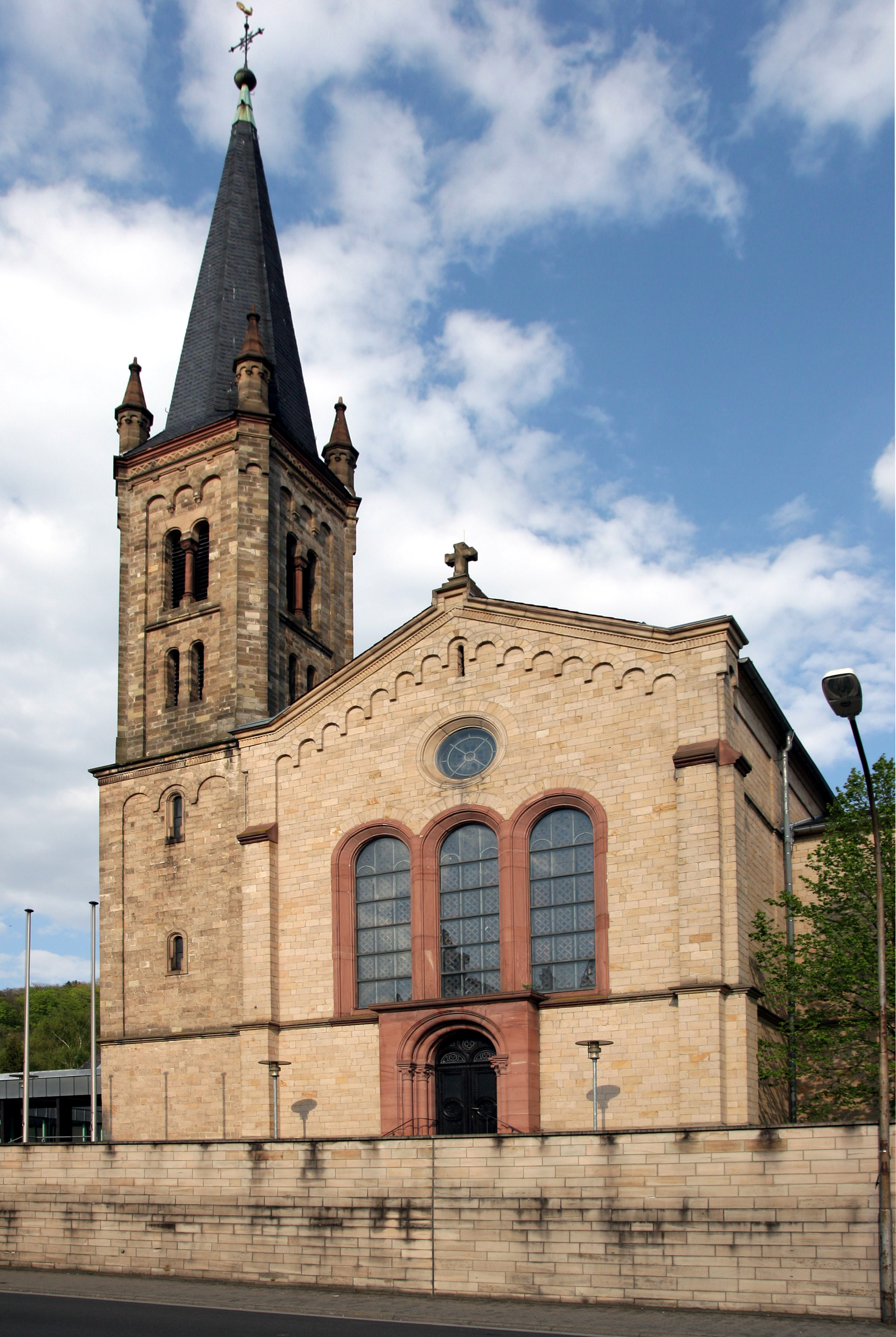 Die unter Denkmalschutz stehende Michaelskirche in der Darmstädter Straße 21 der Stadt Bensheim